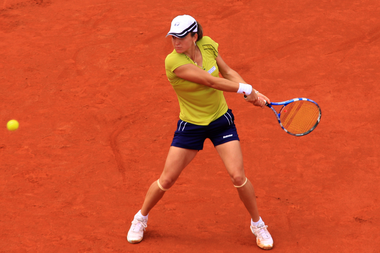 Alexandra Dulgheru